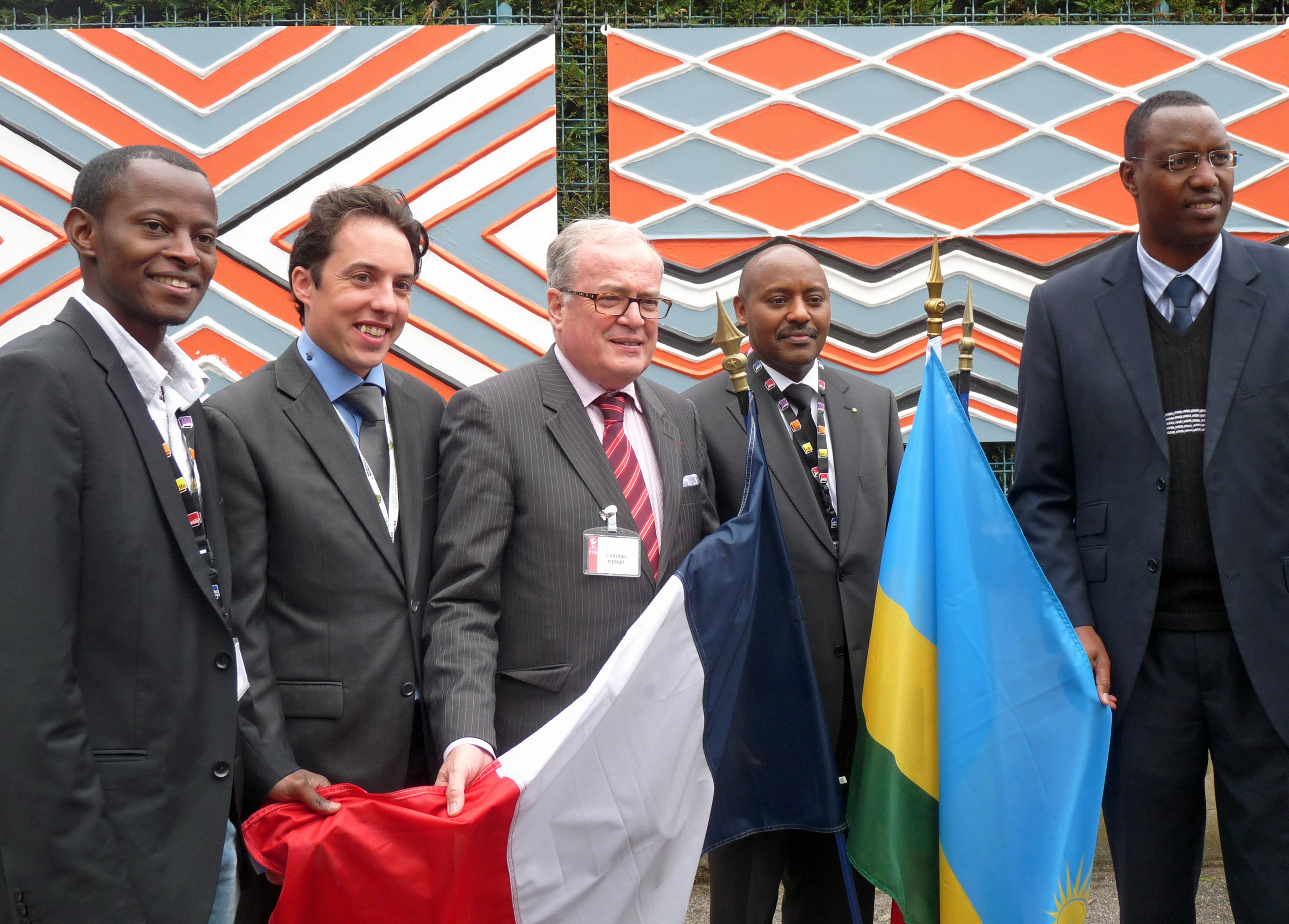 Jacques Kabalé, ambassadeur du Rwanda en France (2e en partant de la droite), inaugurant une fresque Imigongo aux côtés de Christian Pierret dans le cadre du 22e Festival international de géographie de Saint-Dié-des-Vosges 2011